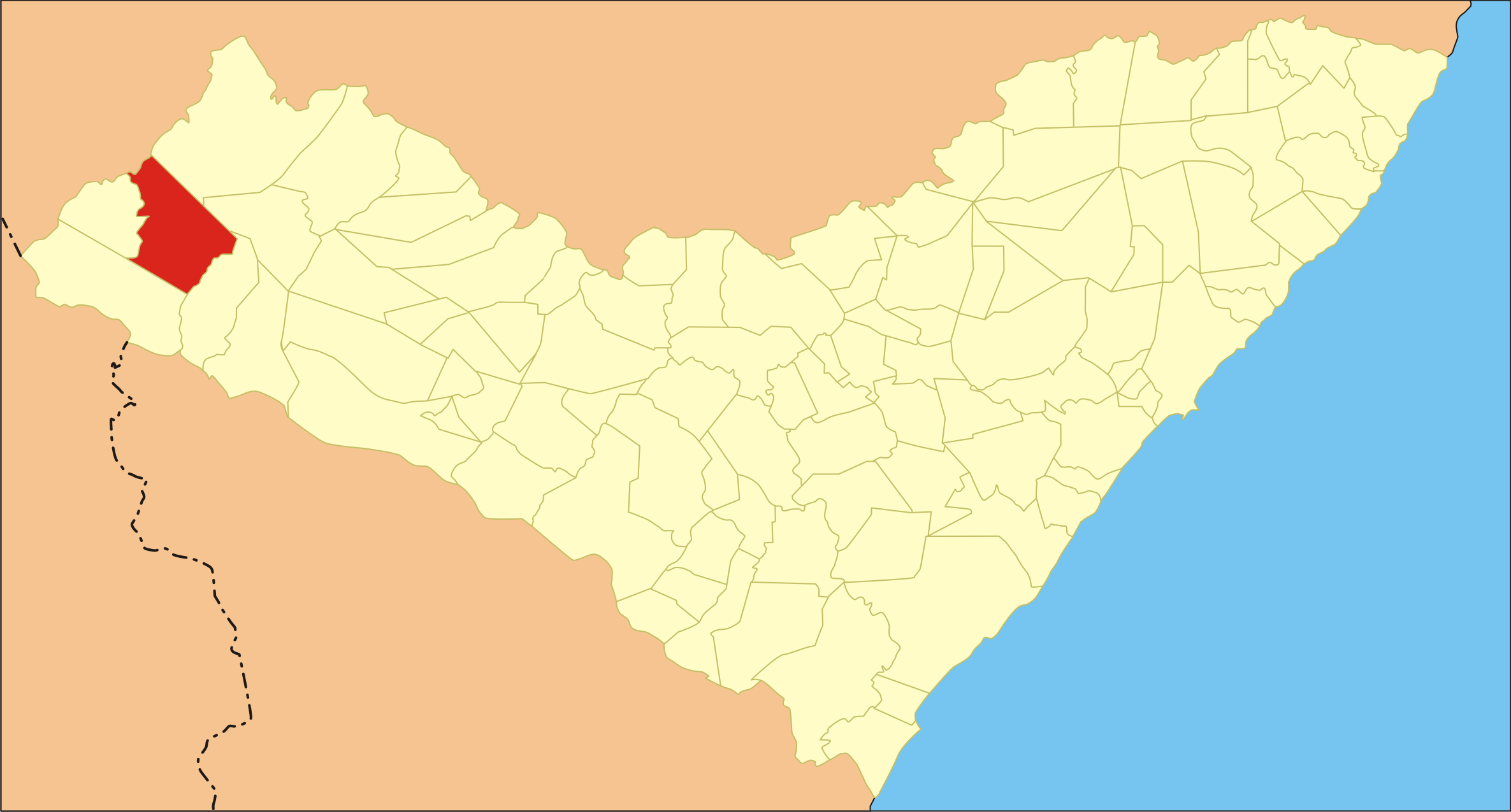 Localização da cidade no estado de Alagoas.